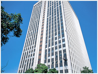 矢崎総業 本社